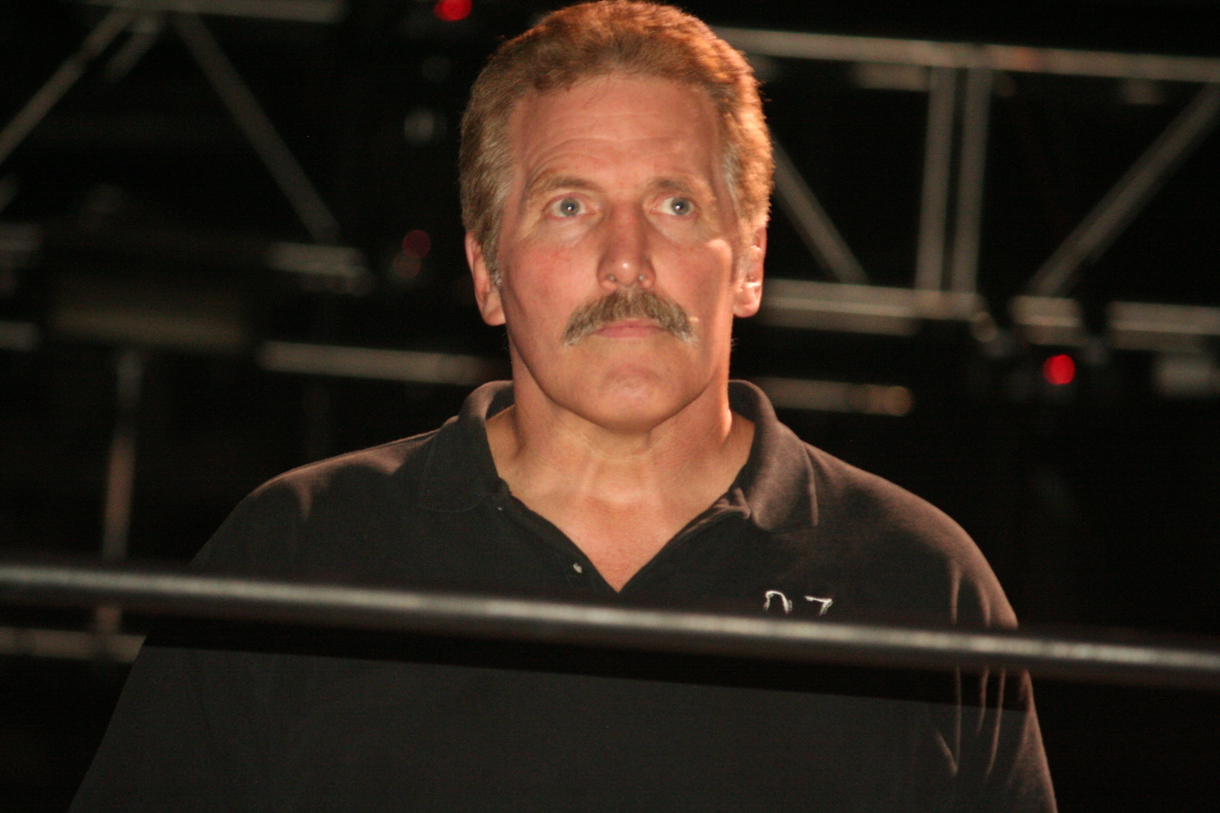 Dan Severn en 2016 avant un combat de catch